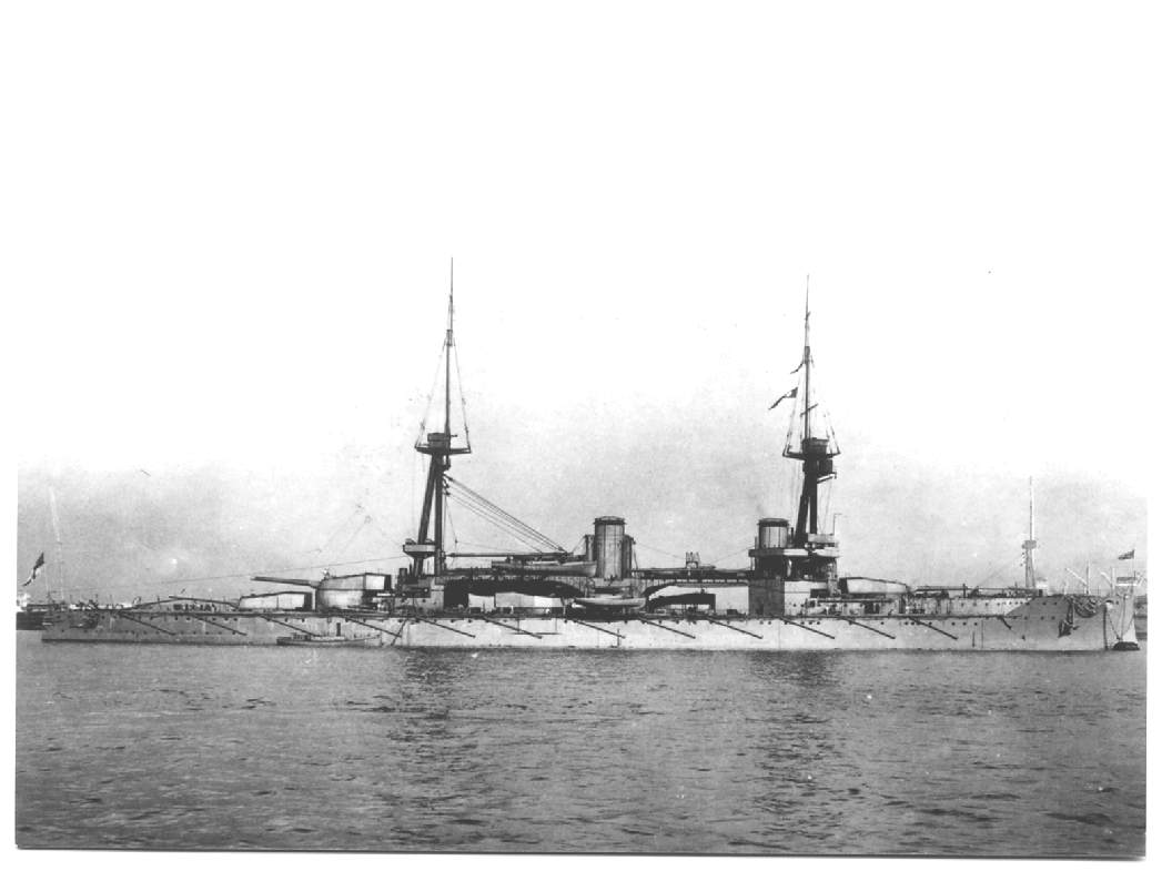 HMS Neptune (1909)